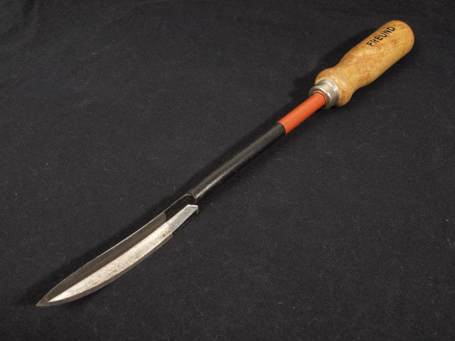 Dreikanthohlschaber Löffelschaber, der Fa. Freund Wuppertal